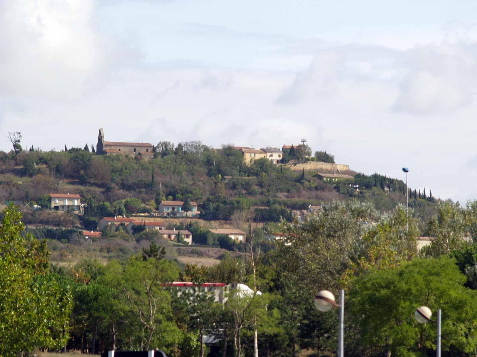 Vue générale